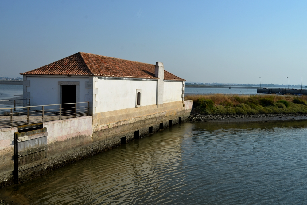 Moinho de Maré do Cais das Faluas, situado no Estuário do Tejo, no Montijo.